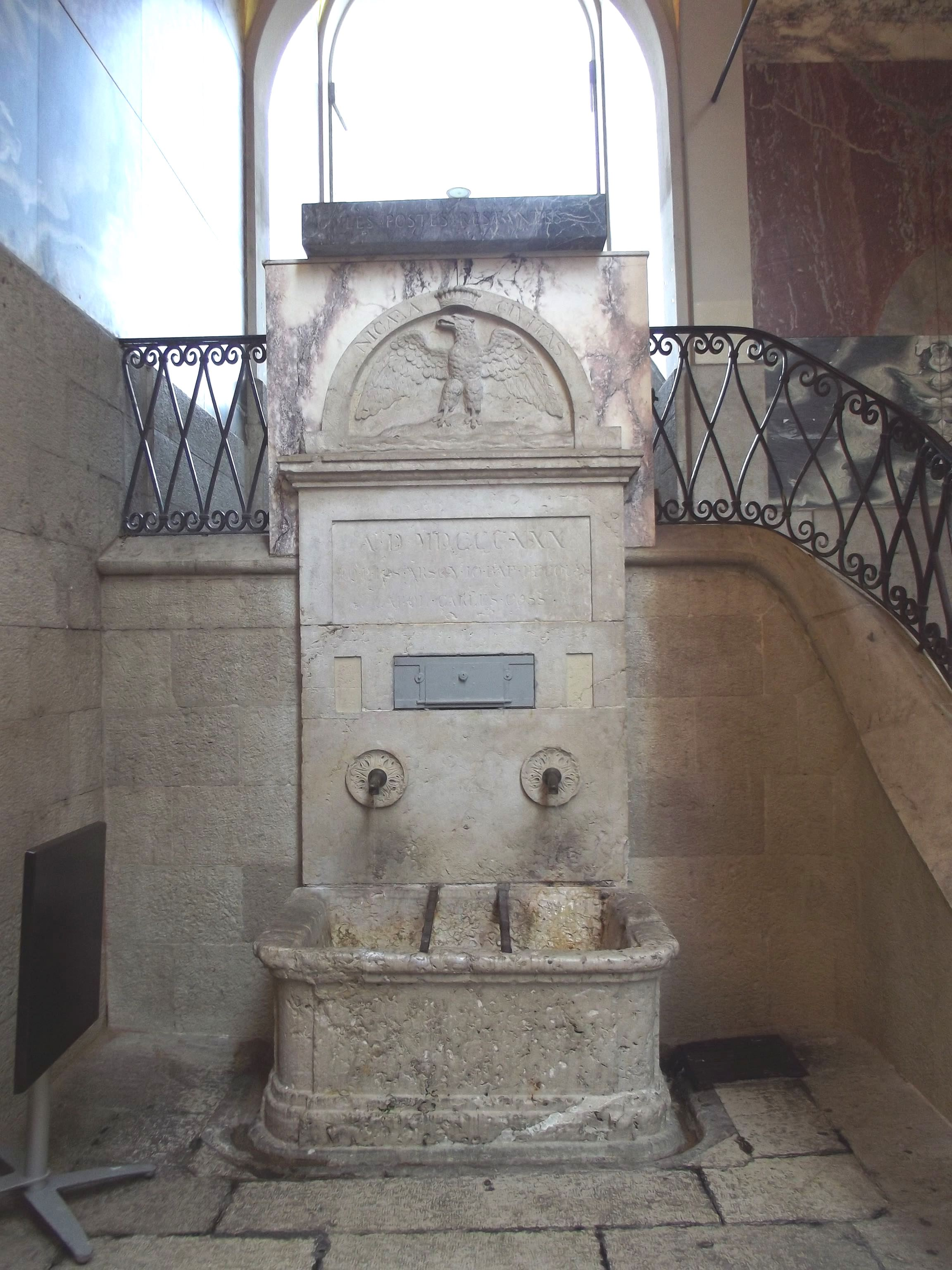 Fontaine de la porte fausse à Nice (anciennement dénommée Fontaine des tripiers)